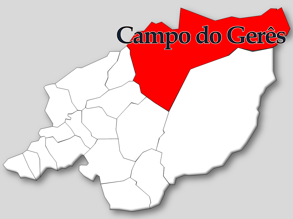 Censos 1864/2011